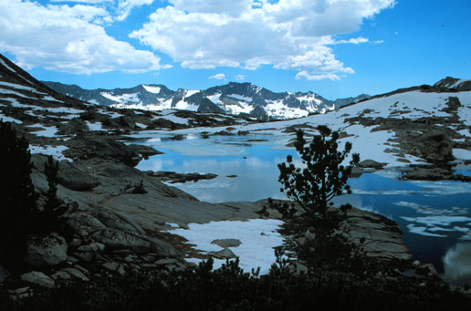 Dusy Basin, Kings Canyon National Park.